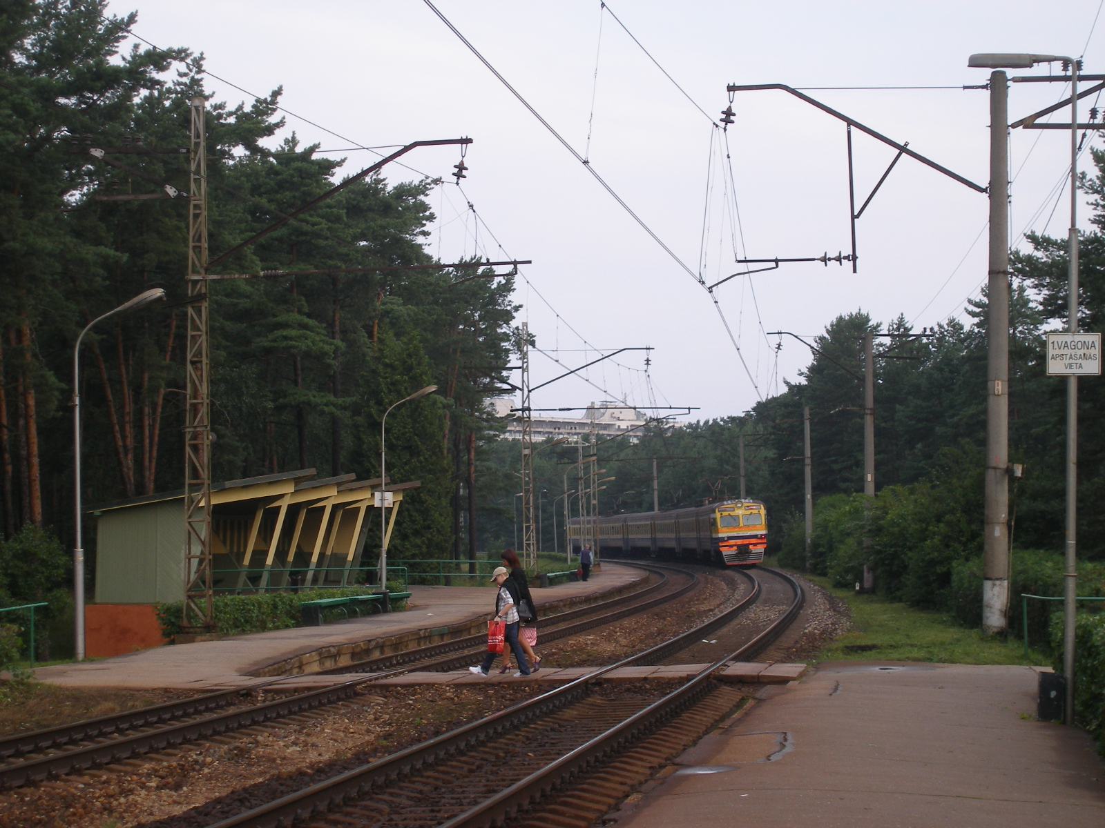 Elektrovilciens ER2-1341 atiet no Lielupes stacijas.